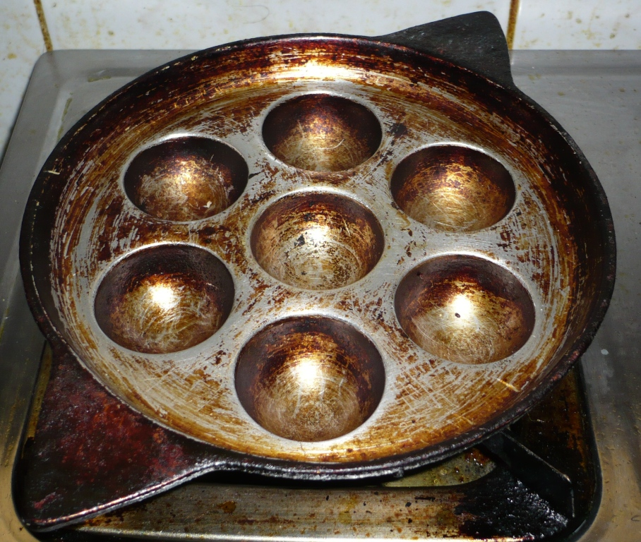 ഉണ്ണിയപ്പം ഉണ്ടാക്കുന്ന ചട്ടി